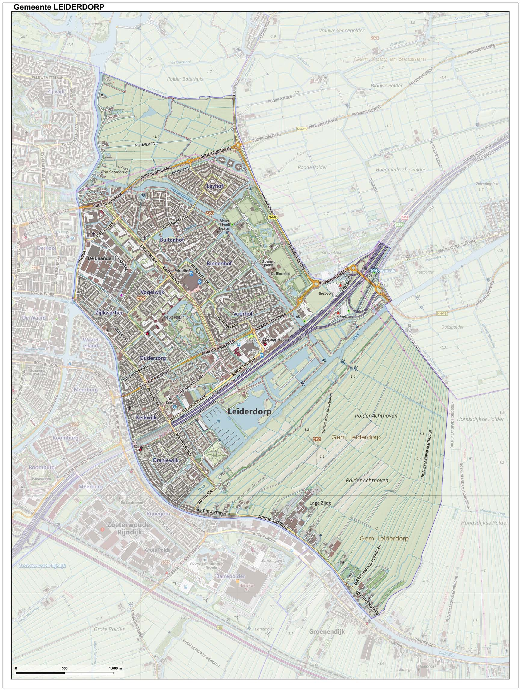 Topografische gemeentekaart. Resolutie: 400 pixels/km. Kaartbeeld samengesteld uit de open geodata van de Top10NL en Top25namen (Kadaster), Creative Commons-BY licentie. Gebouwvlakken uit open geodata BAG extract. Wegen uit de OpenStreetMap, OpenStreetMap community. Reliëfschaduw uit de Actuele Hoogtekaart AHN2. Samenstelling en kleurenschema: Jan-Willem van Aalst, met QGIS. Zie ook de Legenda.